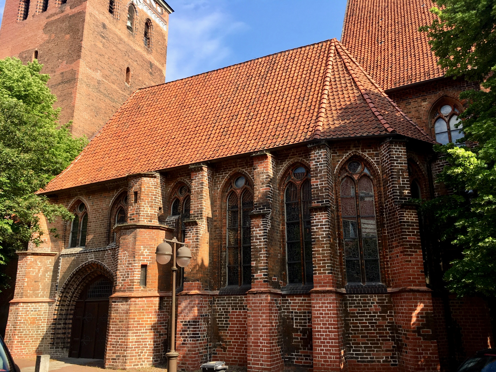 Apostelkapelle, Hansestadt Uelzen